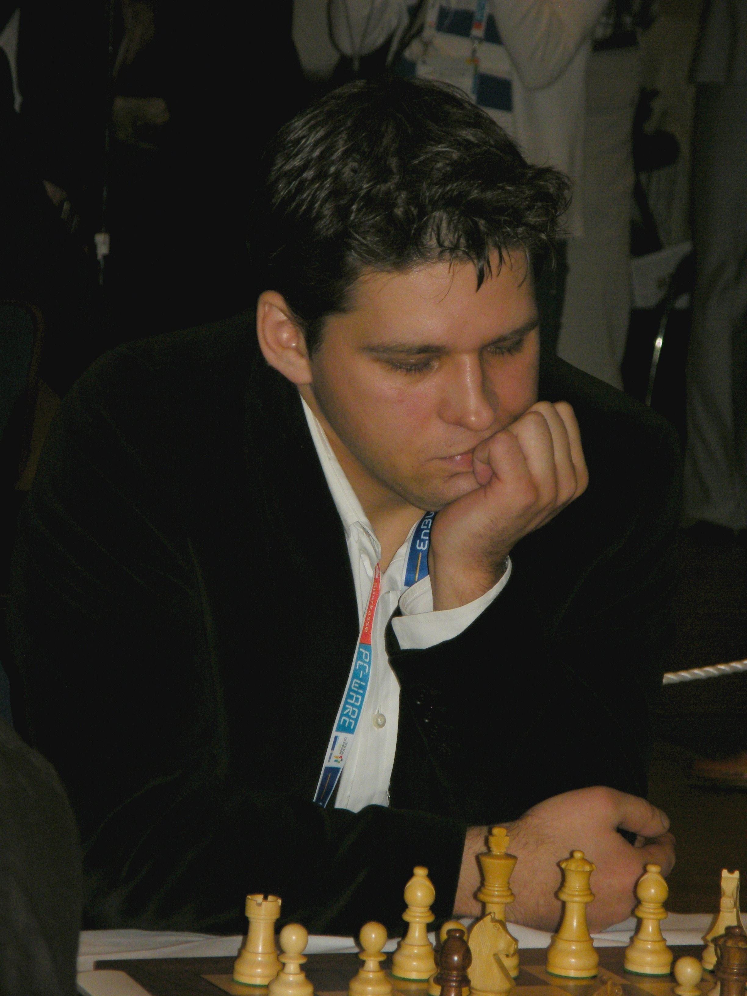 Wladislaw Tkatschiew bei der 38. Schacholympiade in Dresden 2008